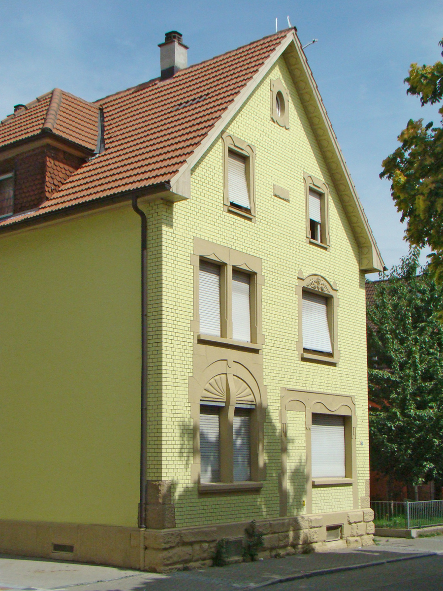 Denkmalgeschütztes Wohnhaus Friedrichstr.30 in Heilbronn-Böckingen